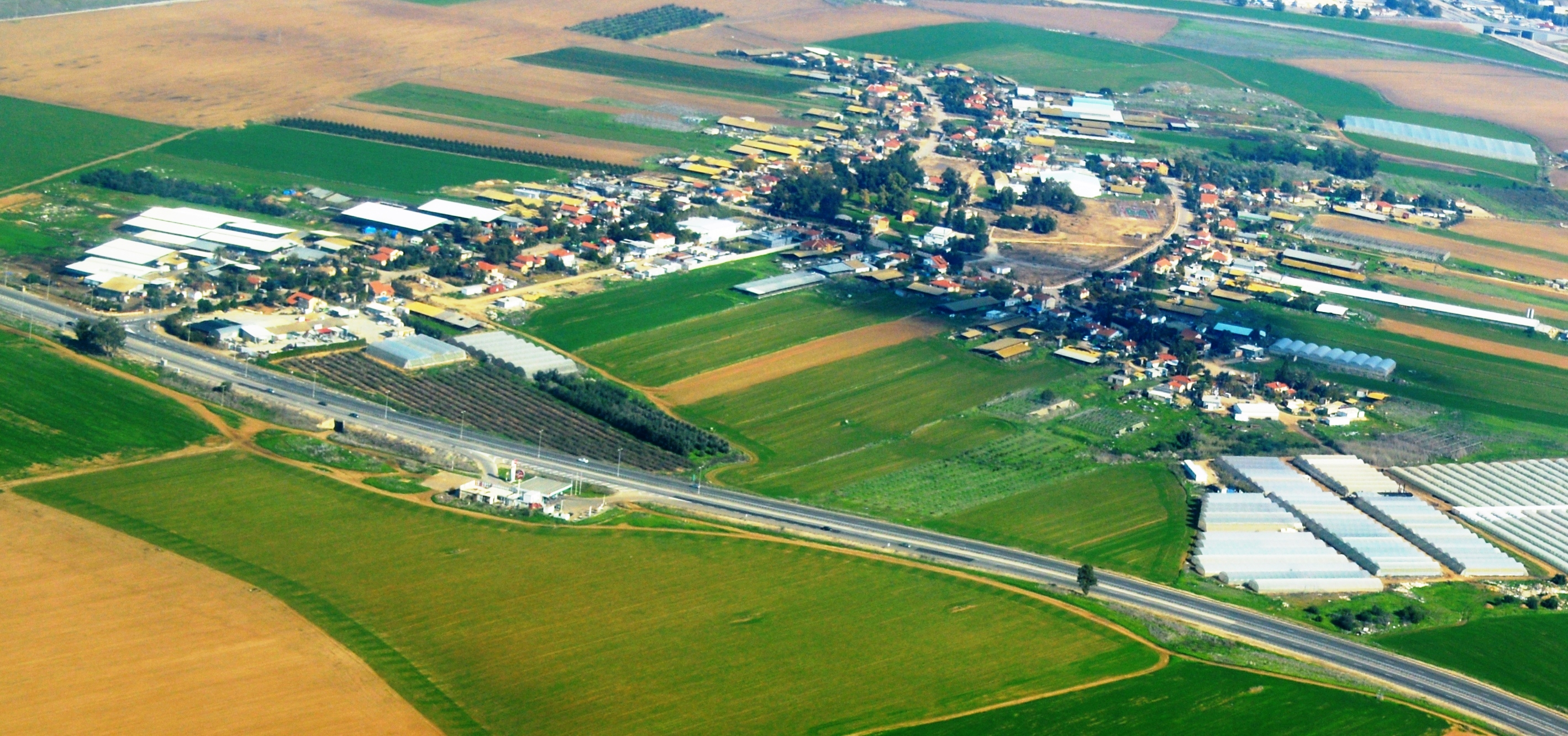 צילום אוויר - מושב עוזה